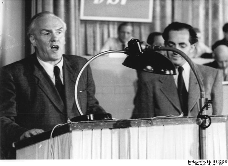 Deutscher Schriftsteller-Kongreß in Berlin. Vom 4.-6.7.50 findet in Berlin anläßlich des 5-jährigen Bestehens des Kulturbundes zur demokratischen Erneuerung Deutschlands ein deutscher Schriftsteller-Kongreß statt. UBz: Der sowjetische Delegationsleiter Nikolai Tichonow, bei seinen Ausführungen. Aufn.: Illus-Rudolph leu. 7100-50 4.7.50